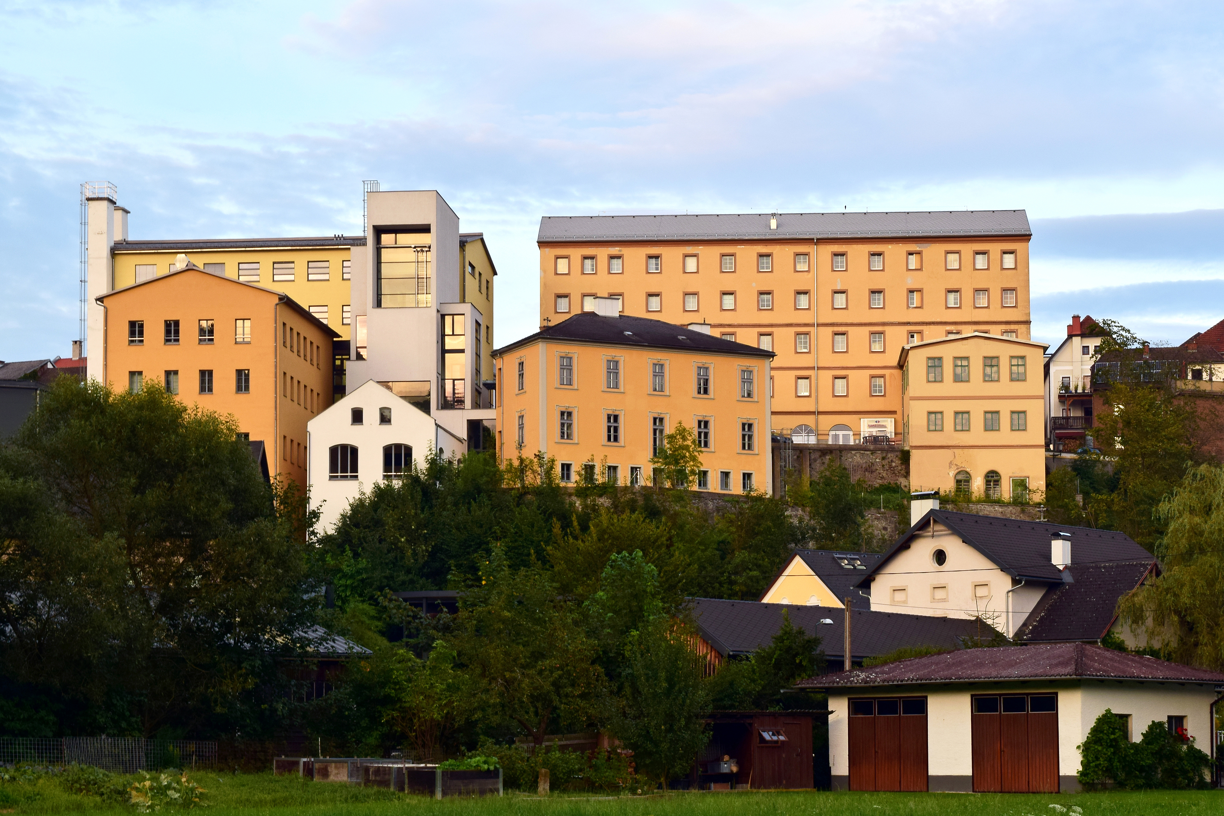 Denkmalanlage Textilfabrik Vonwiller